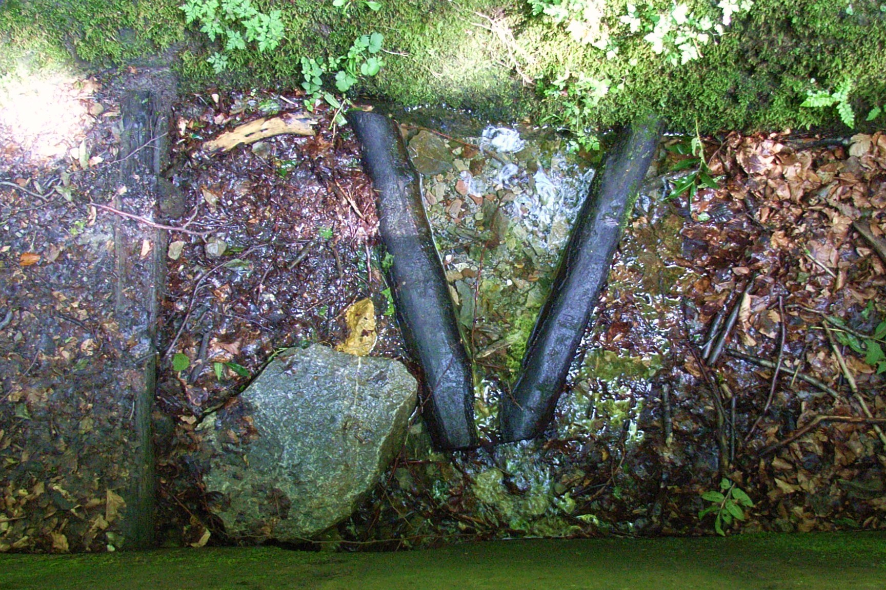 Der Kaplansborn liegt an der Straße zwischen Bad Driburg und Siebenstern. Das Wasser fließt dem Hilgenbach zu. Der Wanderer findet hier frisches, klares Wasser, vorausgesetzt er ekelt sich nicht vor den Bachflohkrebsen, die hier leben.